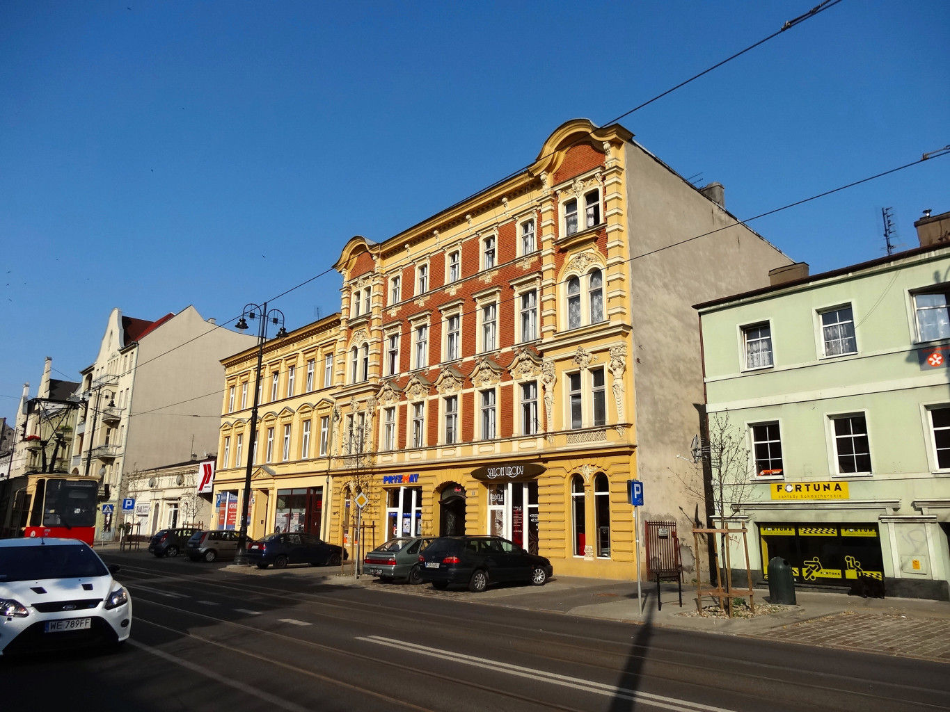 Kamienica przy ul. Gdańskiej 101 w Bydgoszczy (1892-1893, aut. Józef Święcicki)